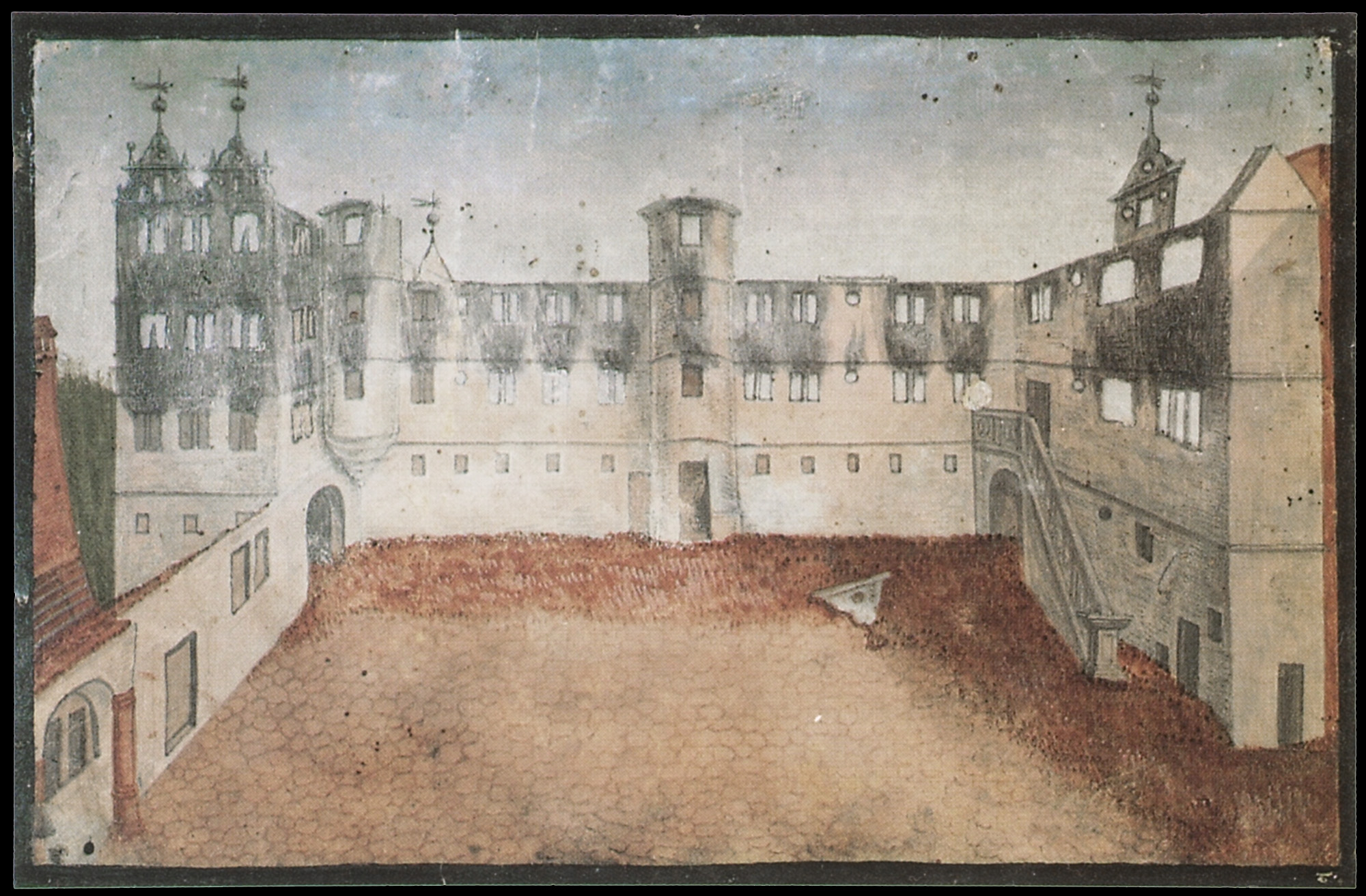 Schloss Hirsau, Ruinen. Stuttgart : Württembergische Landesbibliothek